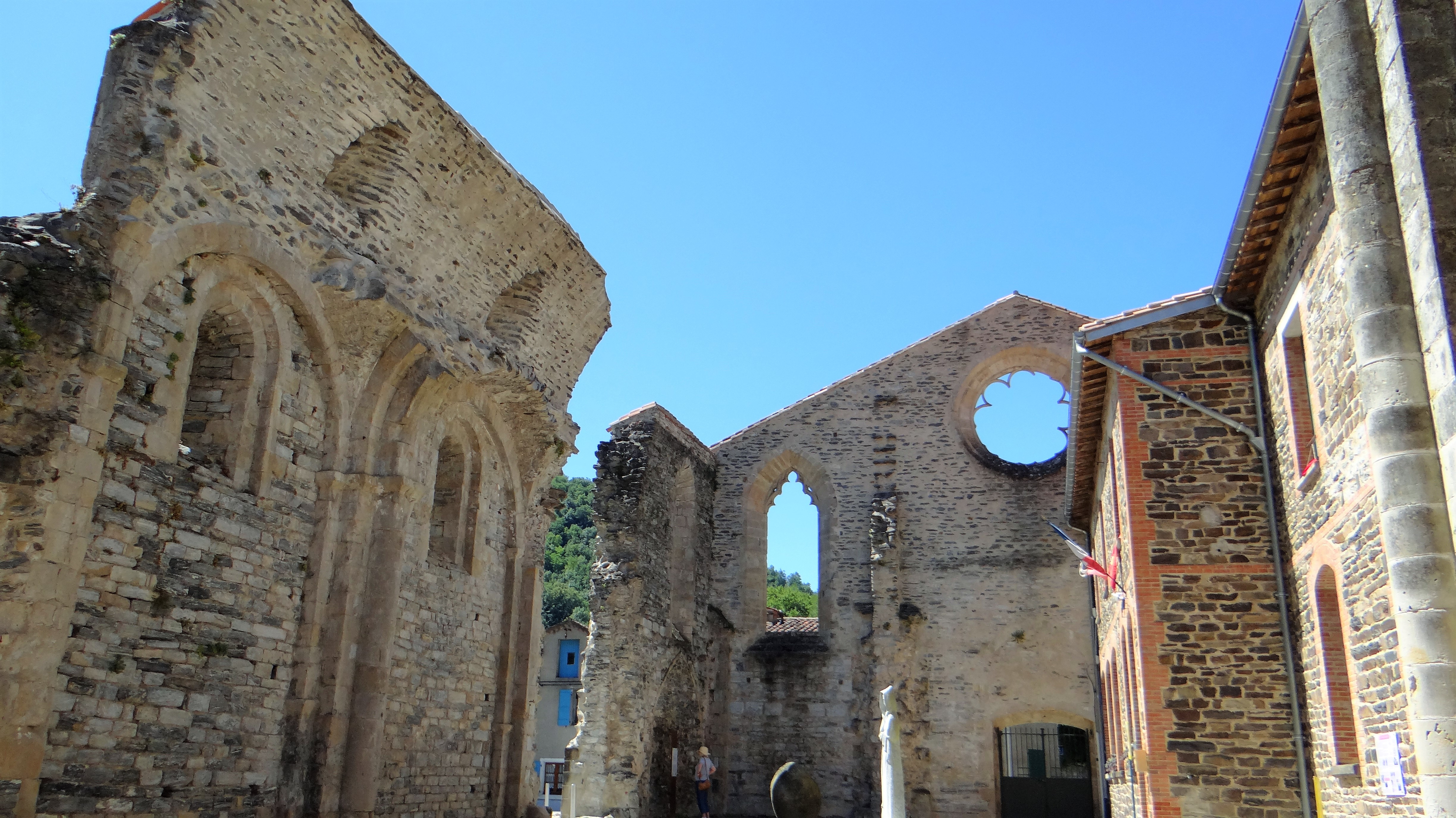 Burlats - Collégiale Saint-Pierre - La nef et la façade du portail principal de la collégiale. À droite, la mairie